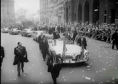 Son appareil photo à la main, Habib Osman est en train de courir afin de retrouver la bonne position par rapport à la procession présidentielle en mouvement (New York)